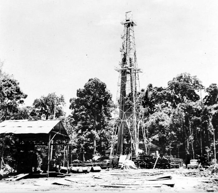 Repronegatief. Een boring van de B.P.M. op het eiland Bunju